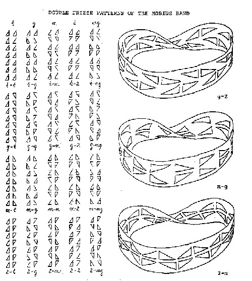 Möbius-szalagra helyezett kettősfrizek